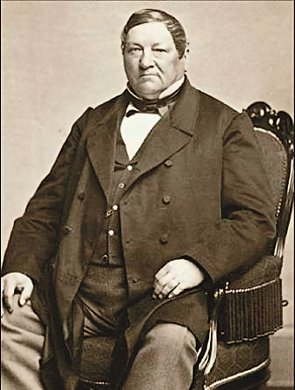 Johan Daniel Grönstedt